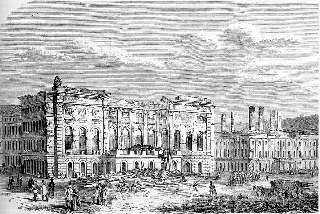 A Redout épülete. Az első bált 1833 januárjában rendezték, és mivel az épületben volt Pest egyedüli koncertterme, így itt koncertezett Erkel Ferenc és Liszt Ferenc is. A Redoute-t 1849-ben a budai osztrák várvédők ágyúikkal szétlőtték.